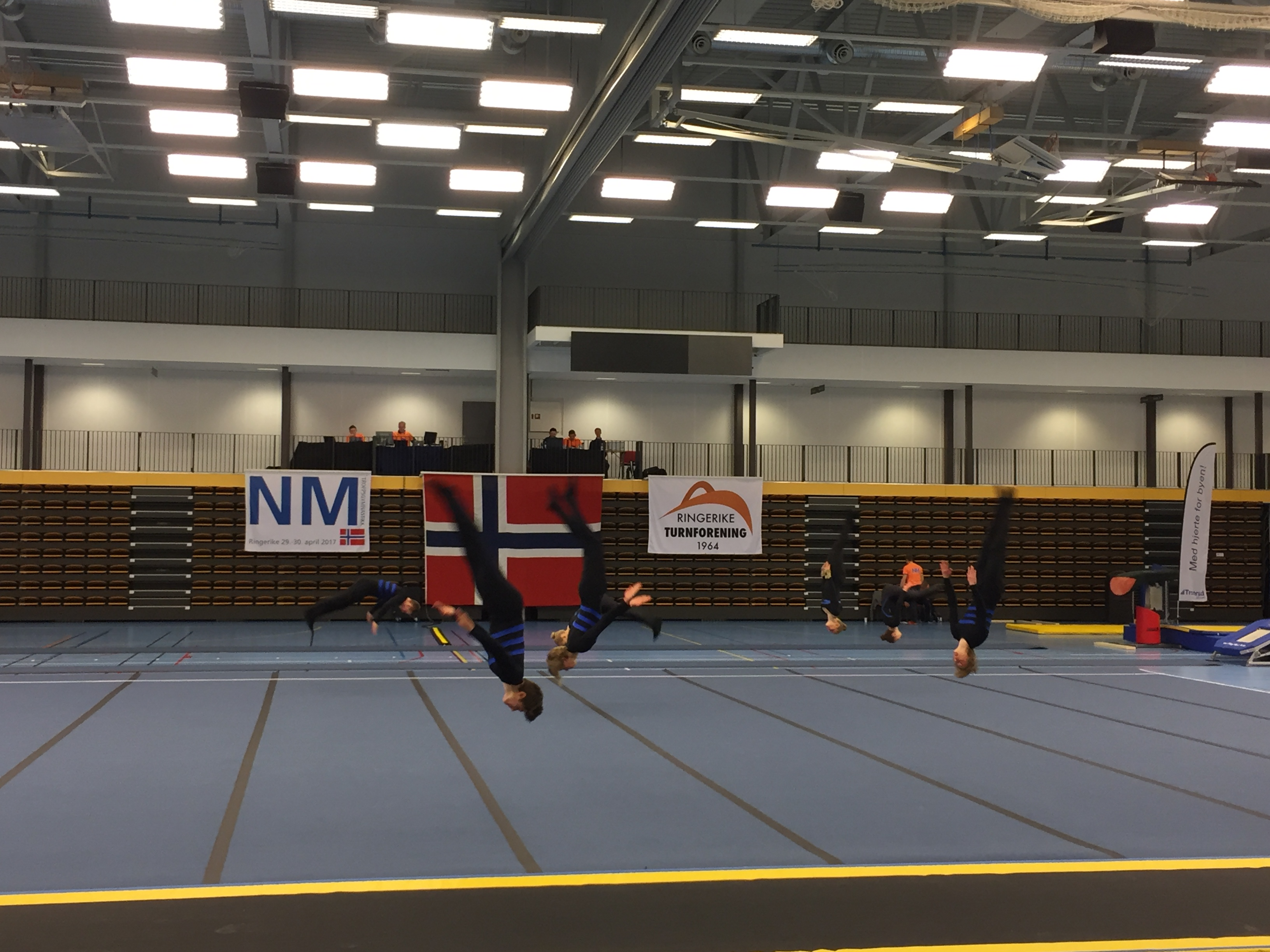 J-NM troppsturn 2017 Ringerike - Oslo Turn mix frittstående i salto